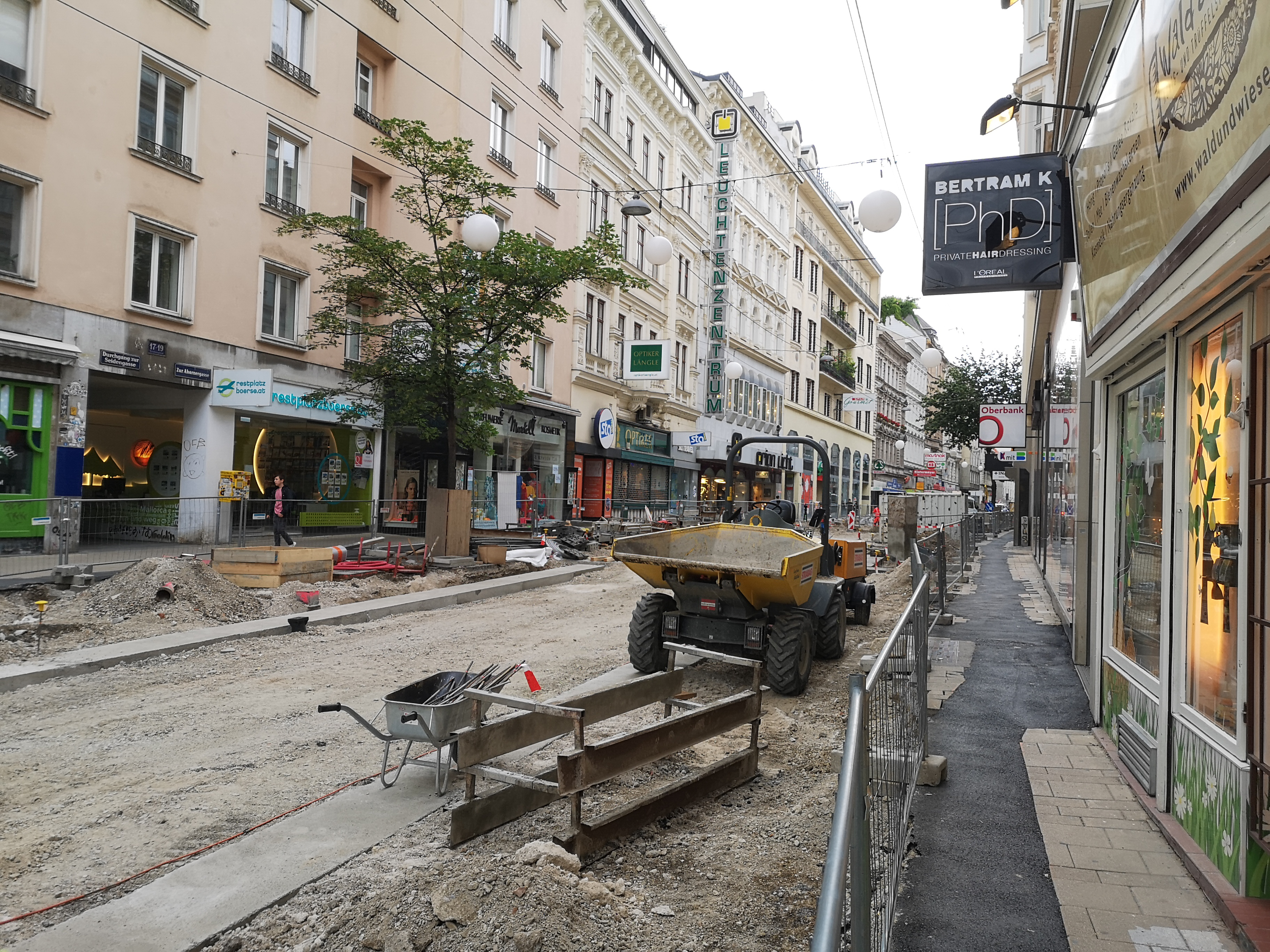 Wien, 19. Juni 2020: Bauarbeiten an der Begegnungszone Neubaugasse